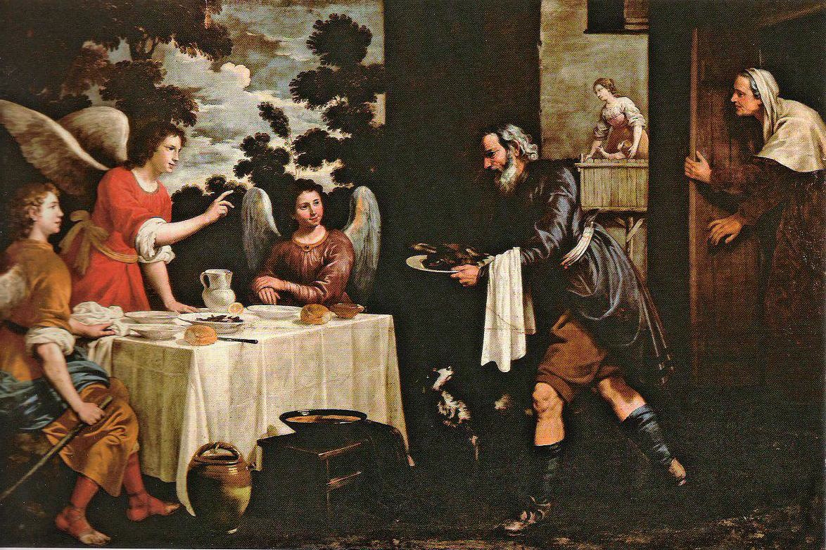 Juan van der Hamen y León - Abraham und die drei Engel